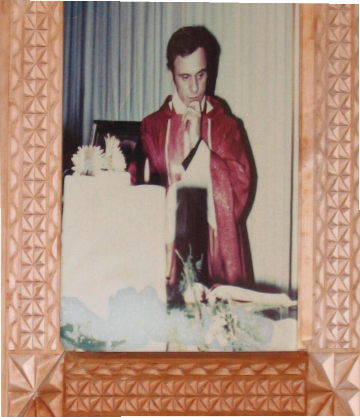 Das Bild von Pfarrer Jerzy Popieluszko aus Polen